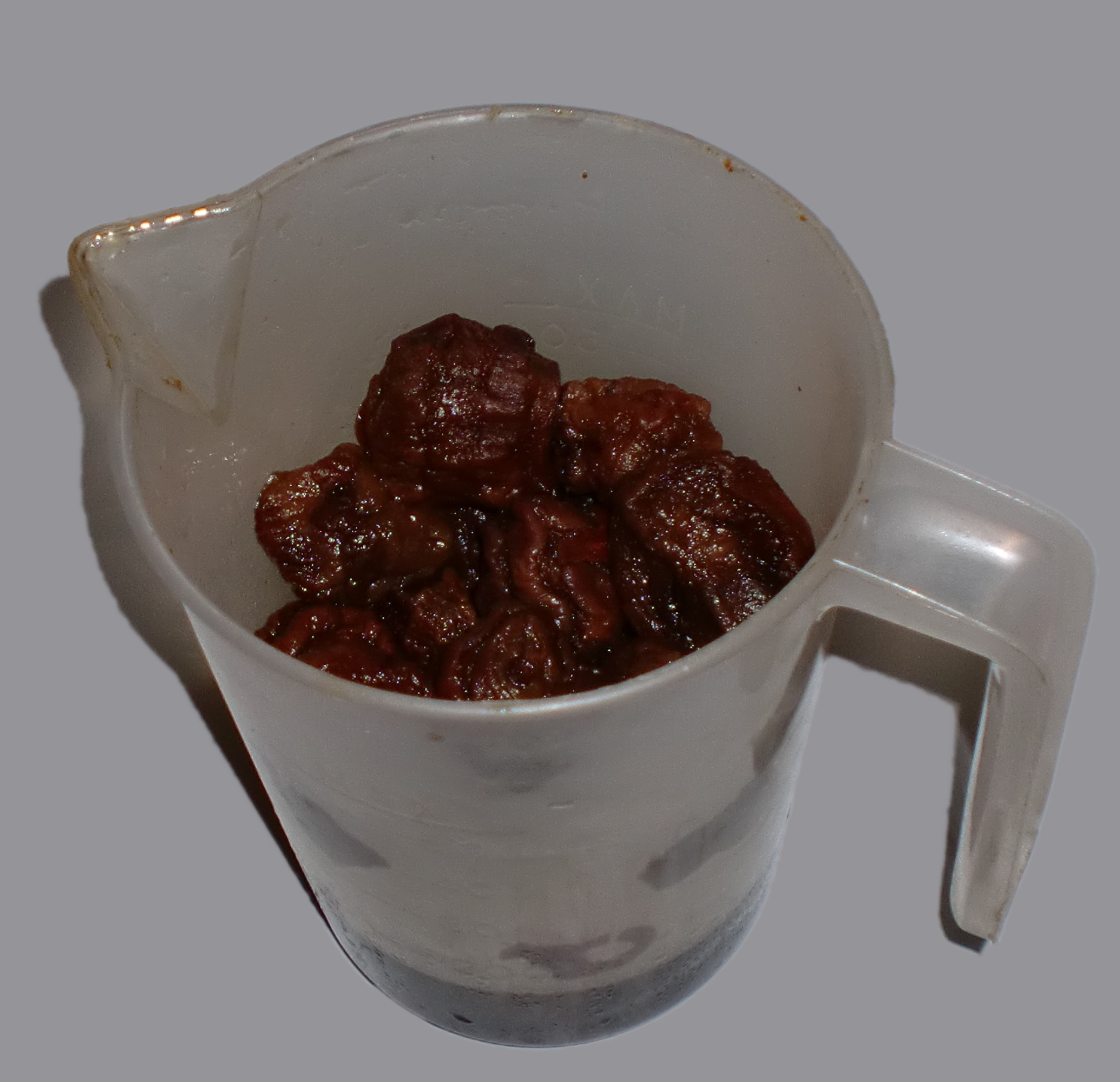 Mocochinchi: durazno pelado y disecado, que sirve para preparar una bebida refrescante (cocina de Bolivia)